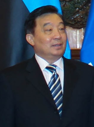 王晨，中共中央政治局委员，全国人大常委会副委员长，2018年